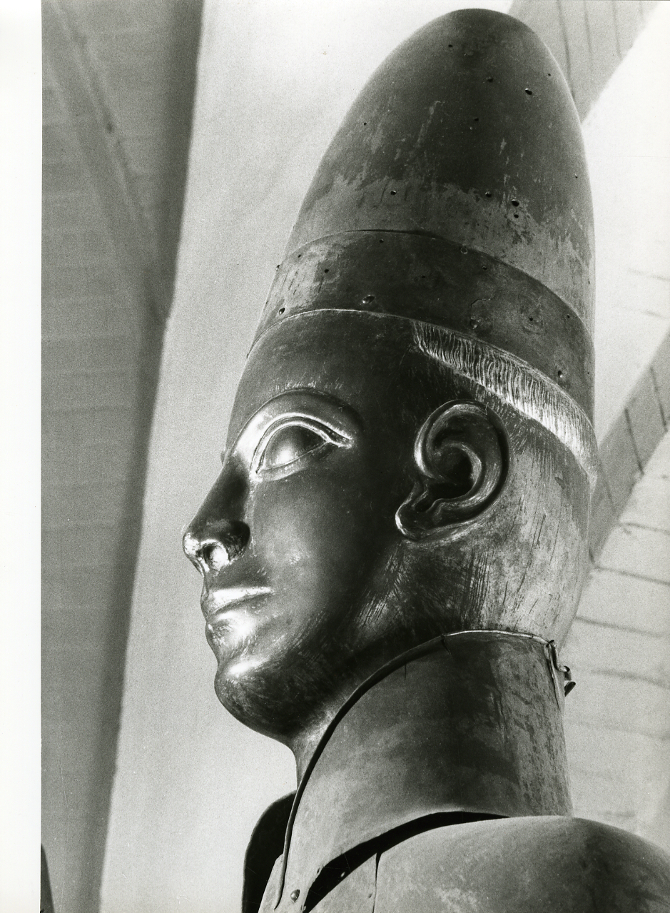 Servizio fotografico : Bologna, 1974 / Paolo Monti. - Stampe: 5 : Positivo b/n, gelatina bromuro d'argento/ carta, 24x30. - ((Al verso delle stampe manoscritti i numeri dei negativi corrispondenti: 151[5], 1515/3, 1514/12, 1515/28, 2662/32. Sul coperchio della scatola, manoscritto a pennarello: "Scultura". - Fonte: Fattura di Paolo Monti: IV. Commesse/ Fattura n. 45/ Riprese fotografiche per documentazione intervento di restauro delle sculture di Jacopo della Quercia nella facciata della Chiesa di San Petronio di Bologna (1979/11/30), presso Archivio Paolo Monti. N. 60 stampe in formato 24x30; n. 60 stampe in formato 18x24. - Fonte: Fattura di Paolo Monti: IV. Commesse/ Fattura n. 38/ Fotografie sculture Jacopo della Quercia in San Petronio - Bologna (1980/07/21), presso Archivio Paolo Monti. N. 32 riprese b/n + 65 diacolor 35 mm; fattura intestata al Signor Ottorino Nonfarmale (San Lazzaro di Savena - BO)